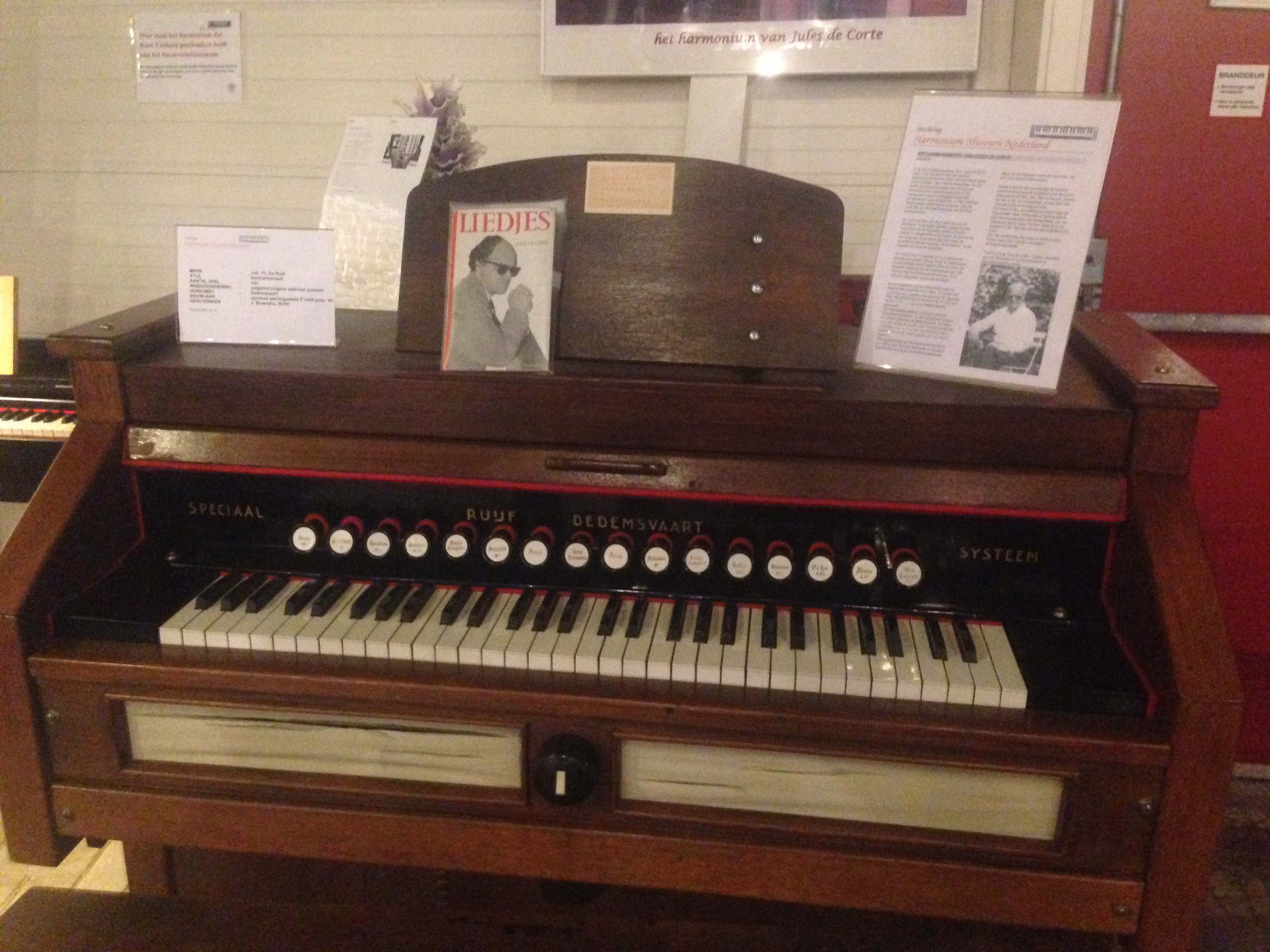 Harmonium Museum Nederland, Veenpark, Barger-Compascuum, Netherlands